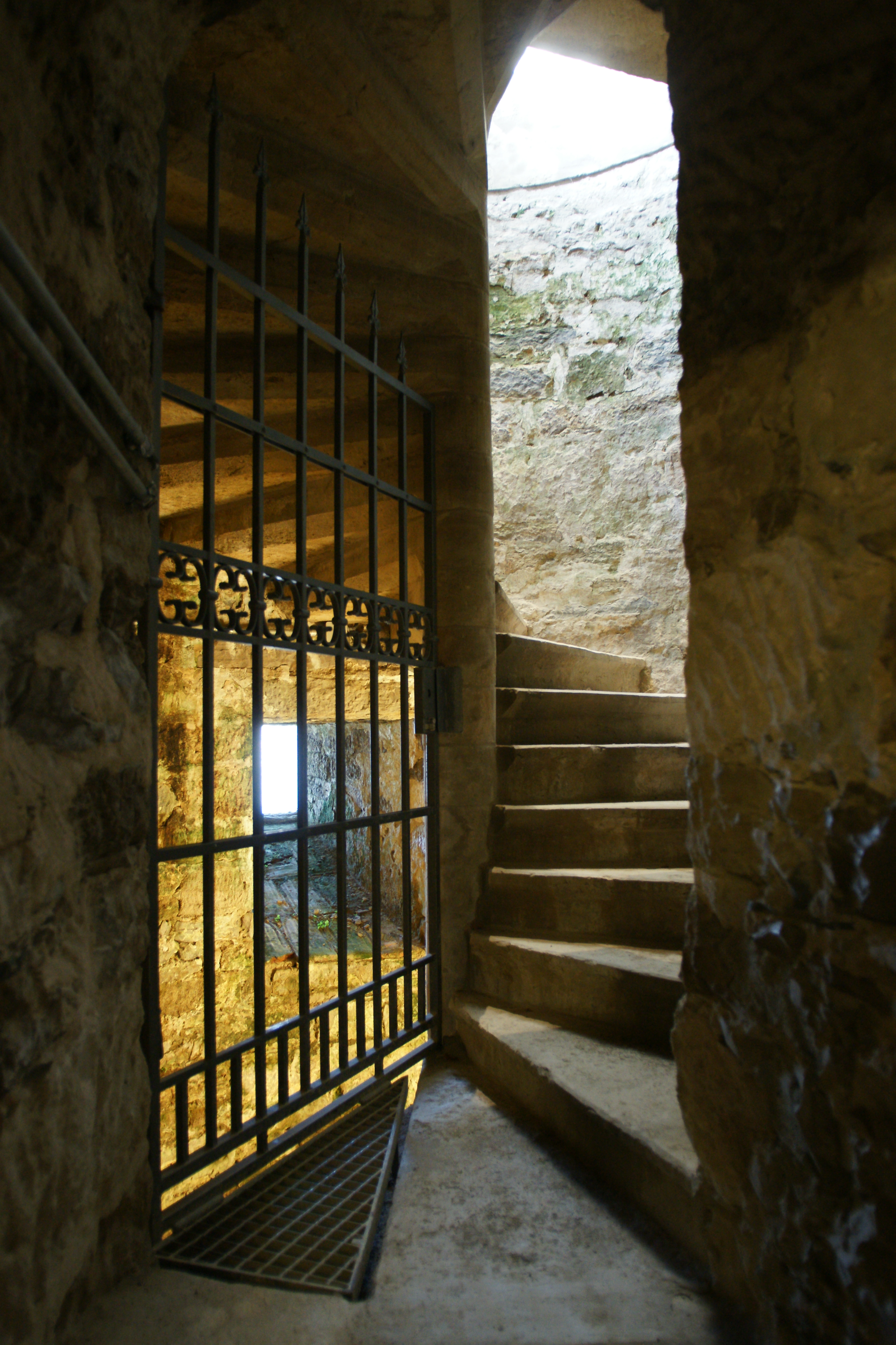 Impressionen auf der Burg Hohenzollern.